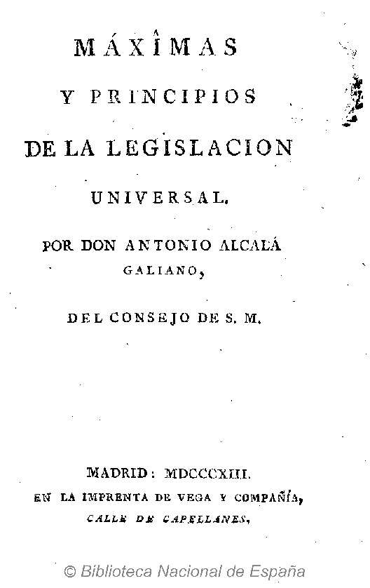 Máximas y principios de la legislación universal por Antonio Alcalá Galiano Autor: Alcalá Galiano, Antonio (1789-1865) Fecha: 1813 Datos de edición: Madrid, en la Imprenta de Vega y Compañía